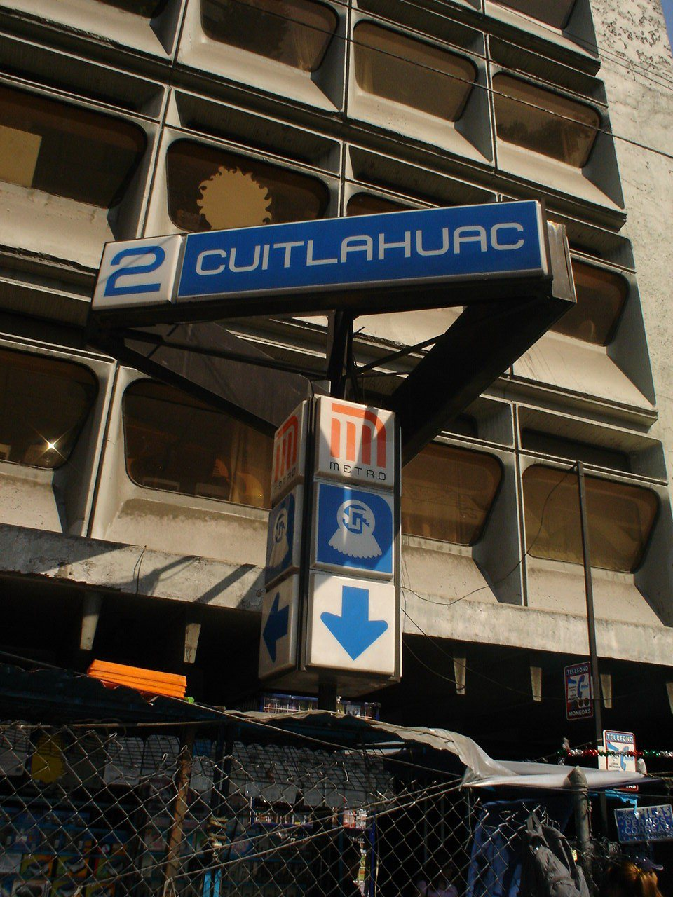 ESTACION CUITLAHUAC